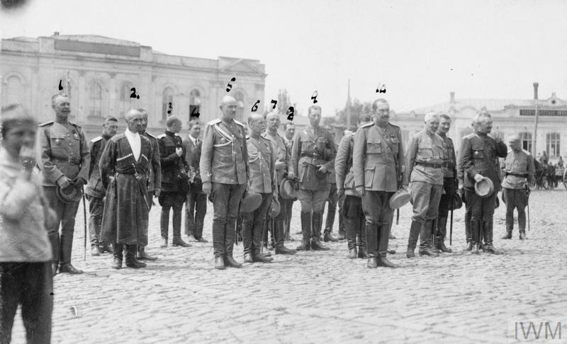 Officers of the White Russian Don Army on parade for blessing of their troops by the Archbishop in the Cathedral Square at Novocherkassk, July 1919. Белые войска Донской армии на параде по благословению своих войск архиепископом на Соборной площади в Новочеркасске, июль 1919 года. 1. Горелов, начальник артиллерии. 2. Представитель терских казаков. 3. Полковник Агаев, генерал Сидорин. 4. Принц Ingleshaw, переводчик. 5. Сидорин, командующий Донской армией. 6. Полковник Kalchauski, начальник штаба донских казаков. 7. Неизвестный. 8. Капитан Найт, артиллерийский инструктор британской военной миссии в Южной России. 9. Сотрудник майор Hudleston Williamson, связи. 10. Богаевский, атаман донских казаков.